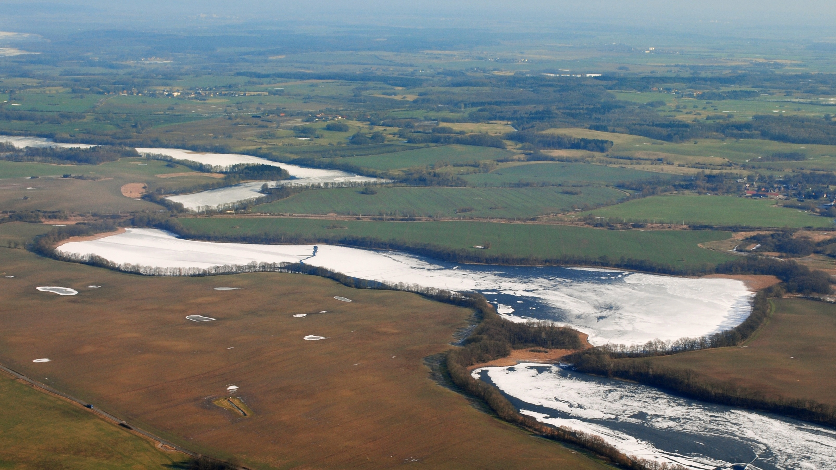 Tiefer See aus Richtung W